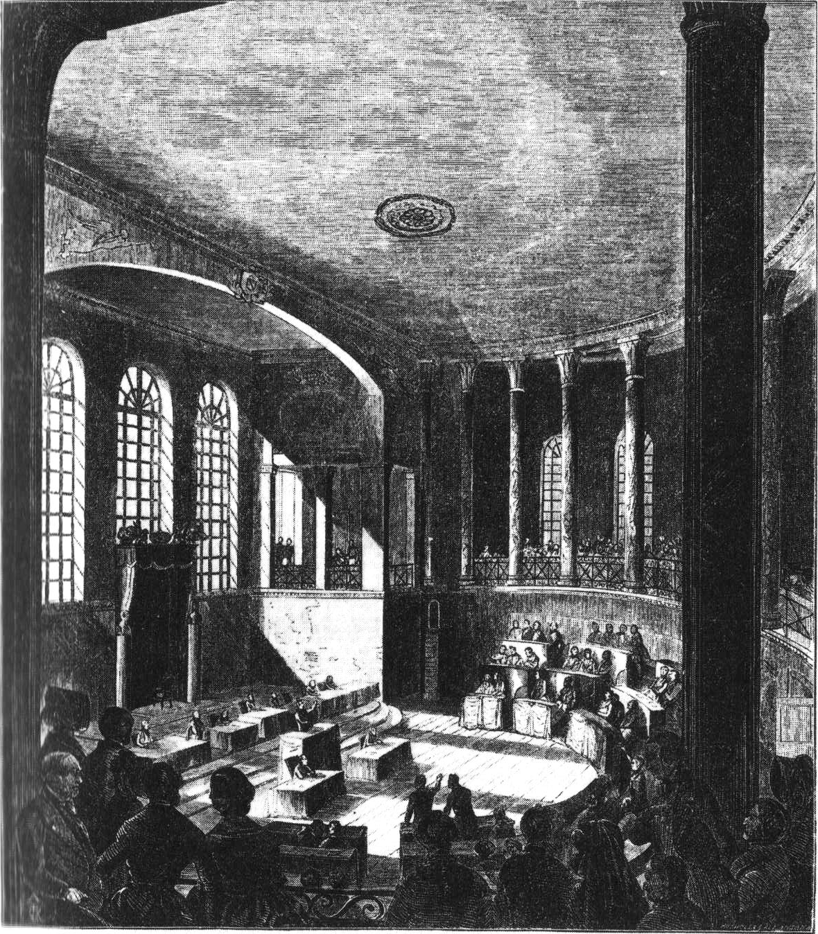 Badische Ständeversammlung / Badenian Parliament